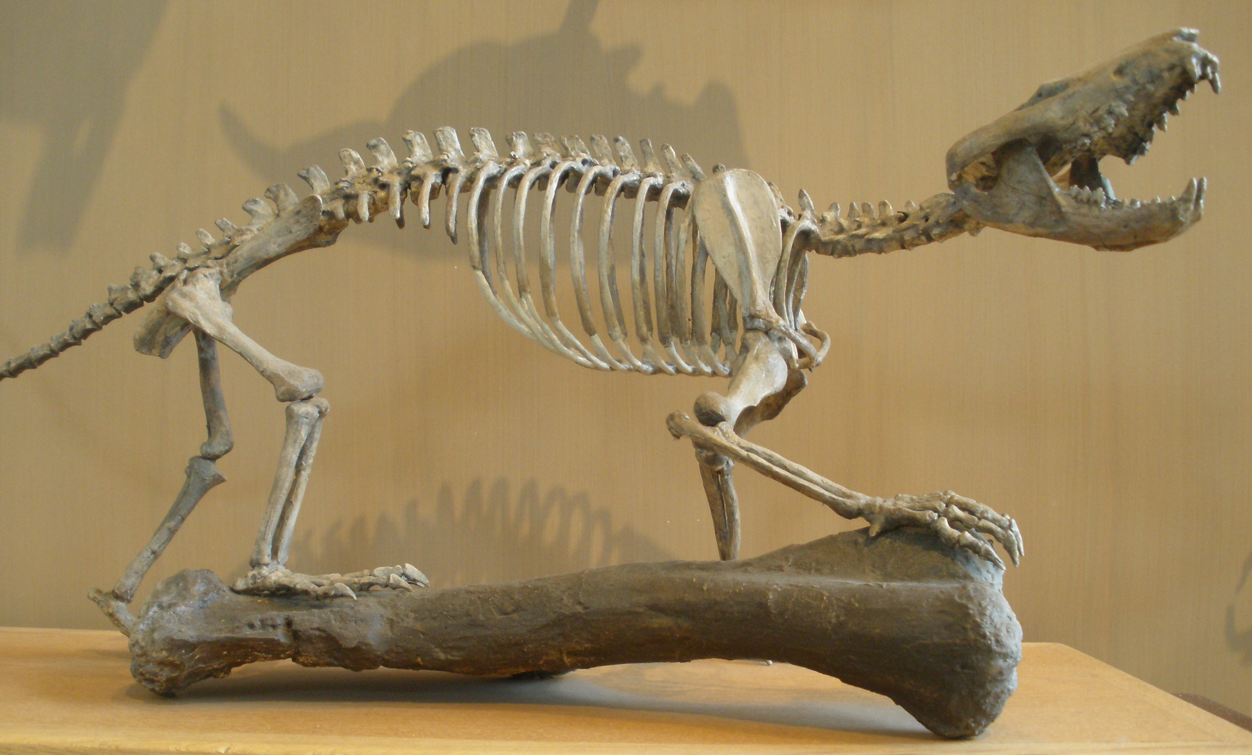 Skeleton of Gobiconodon ostromi, a fossil triconodont